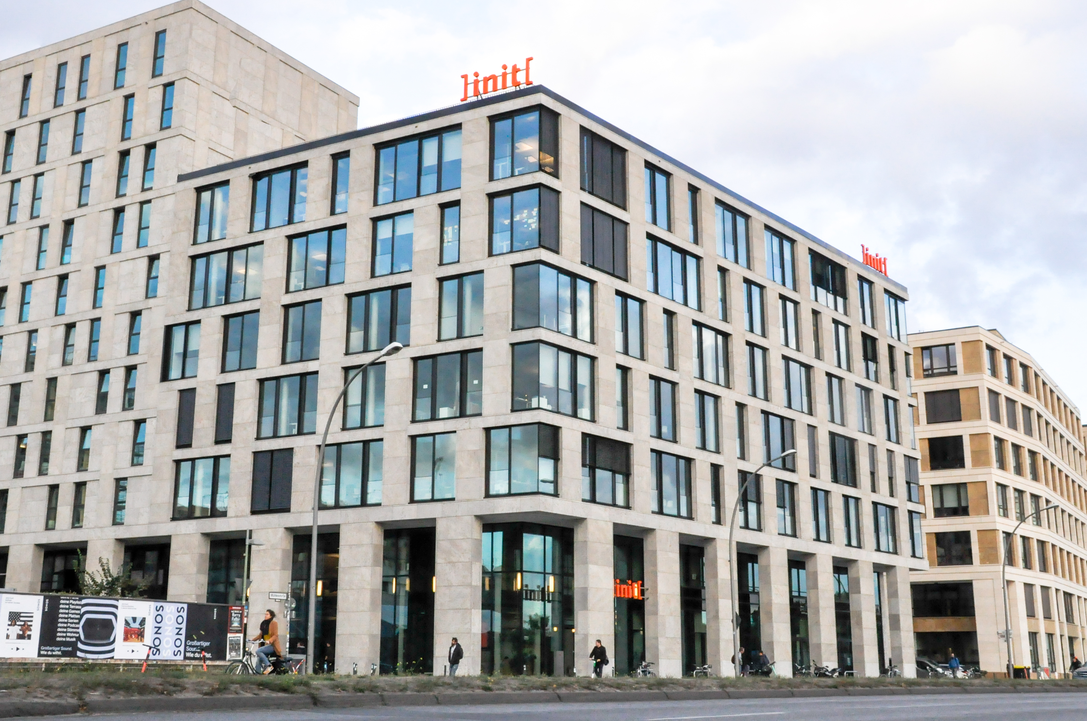 "East Side Office" der Init AG in Berlin